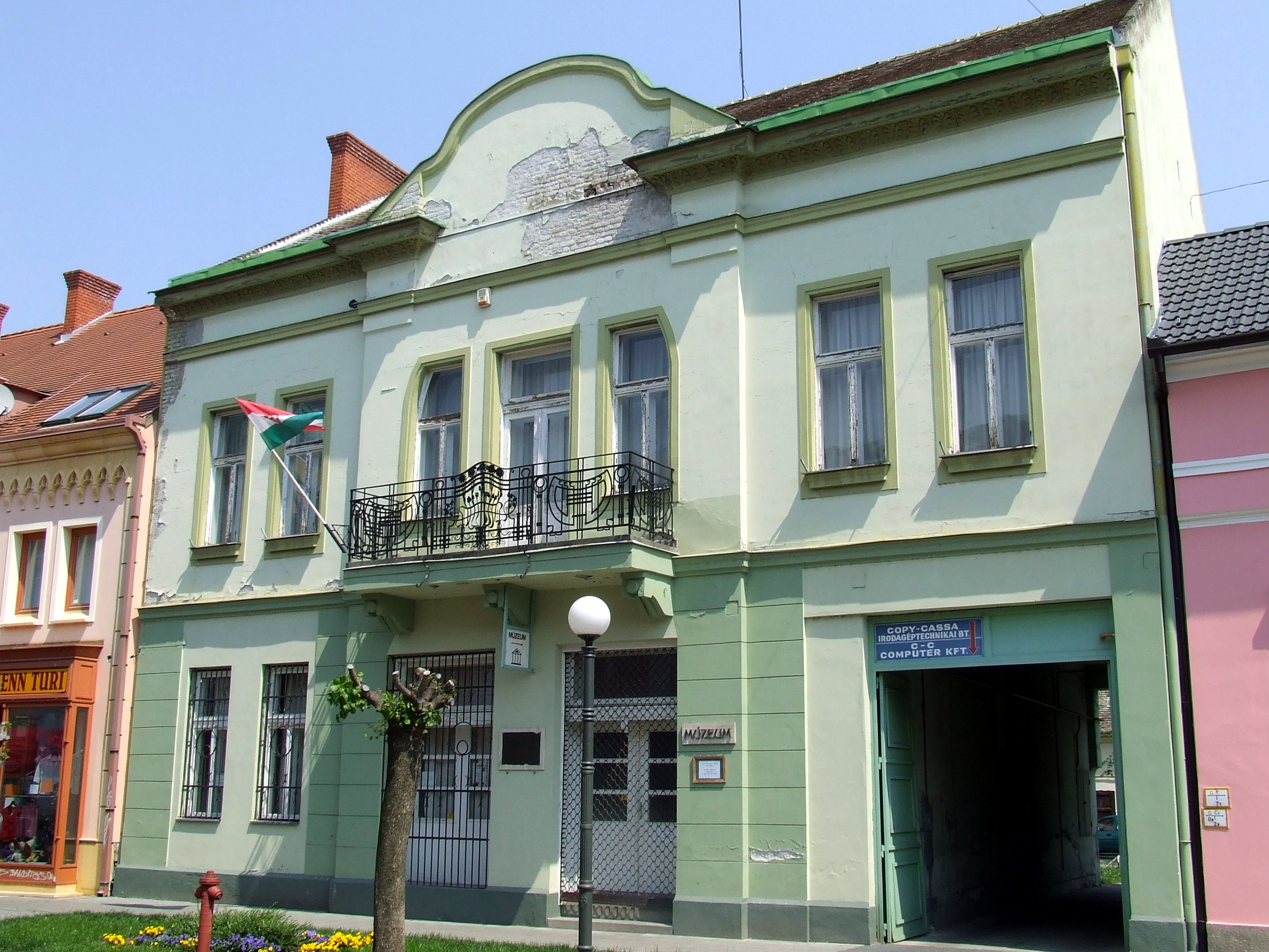 Rozsda Endre festőművész szülőháza Mohácson. Ma a Kanizsai Dorottya Múzeum épülete